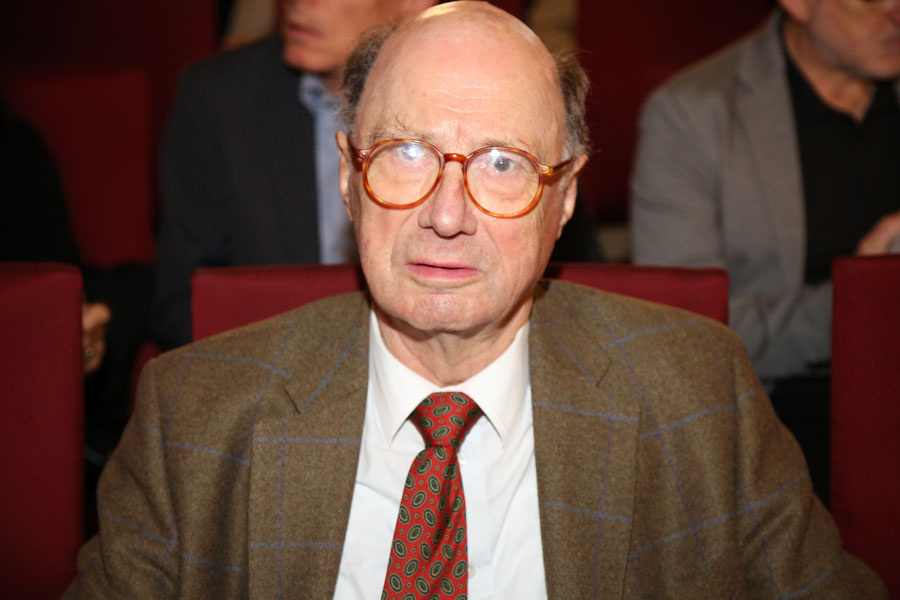 Klaus Emmerich-9378